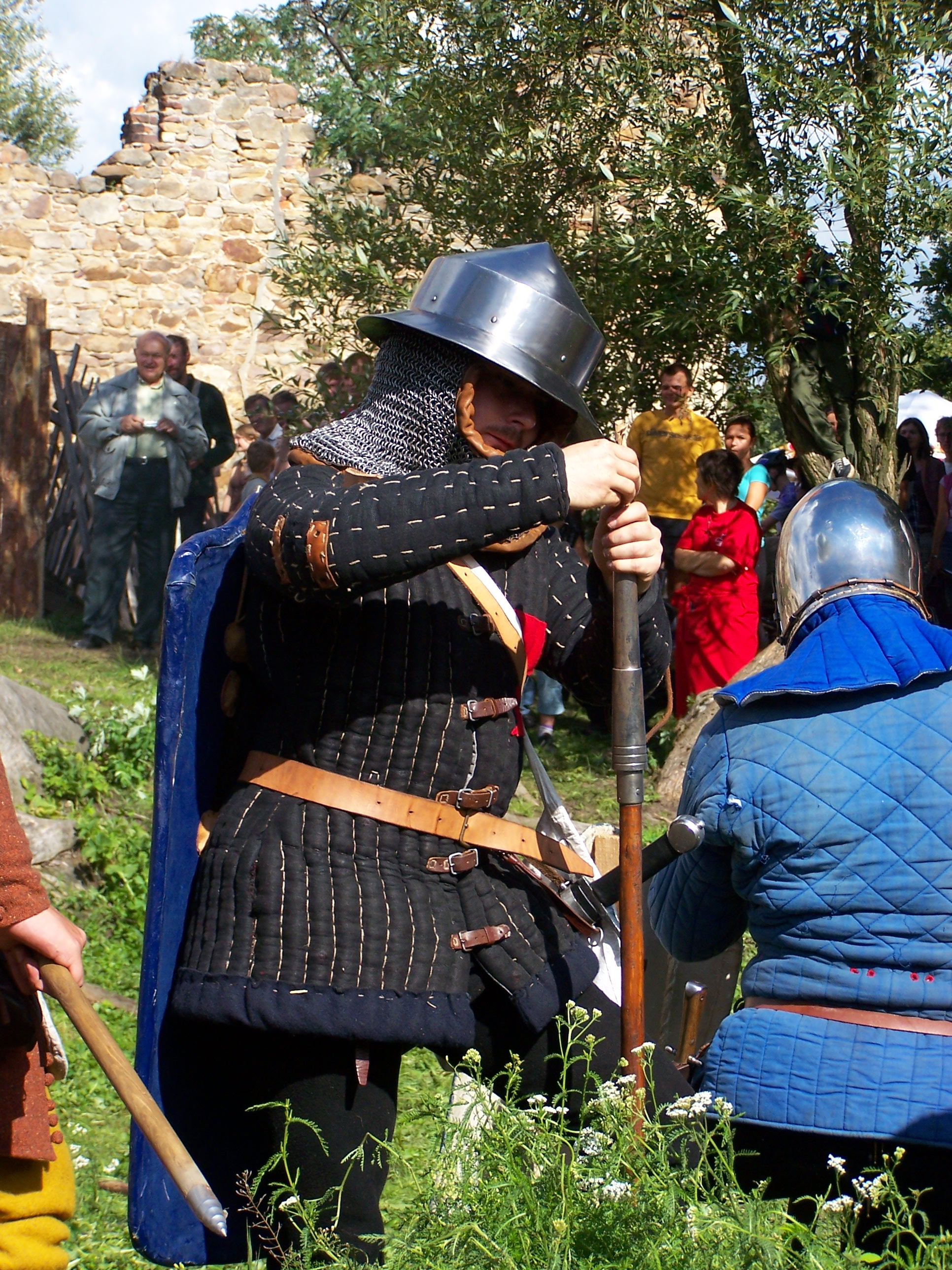 Rekonstrukcja średniowiecznej bitwy z wojskami husyckimi podczas VII Jarmarku Średniowiecznego na zamku w Chudowie.